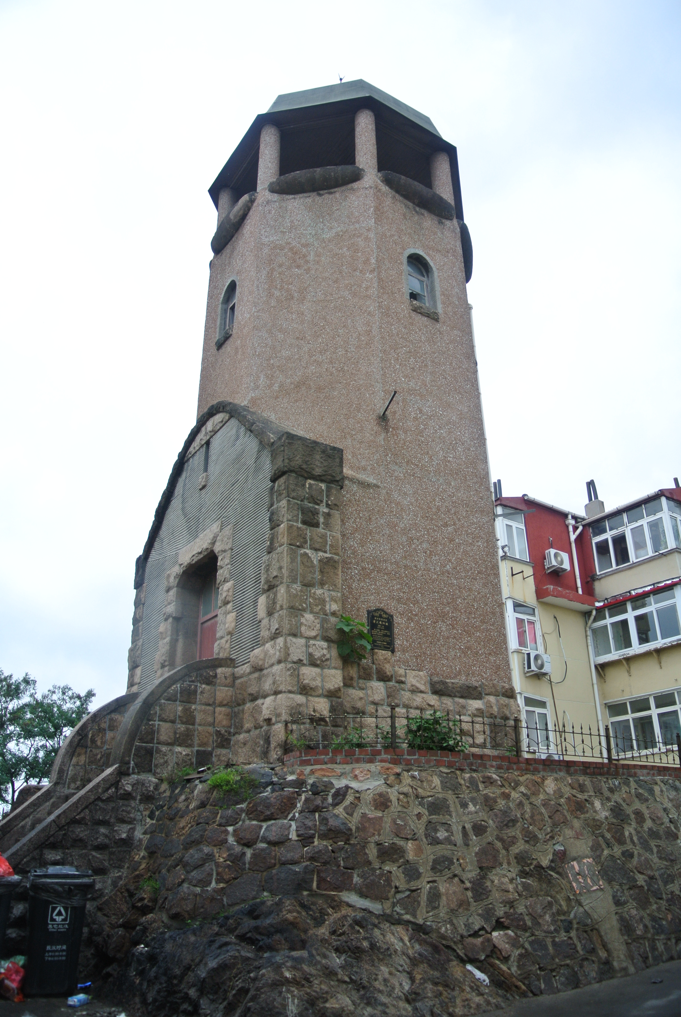 青岛望火楼